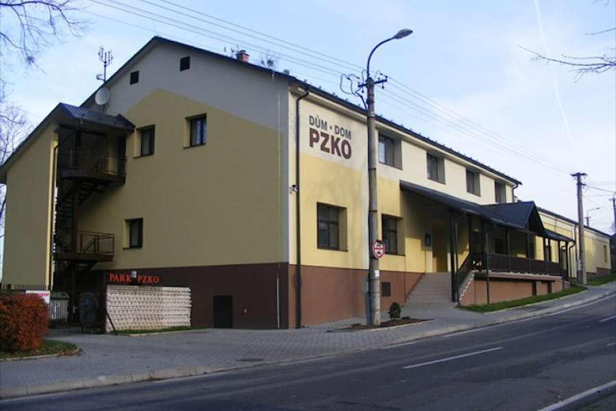 Restaurace PZKO Stonava